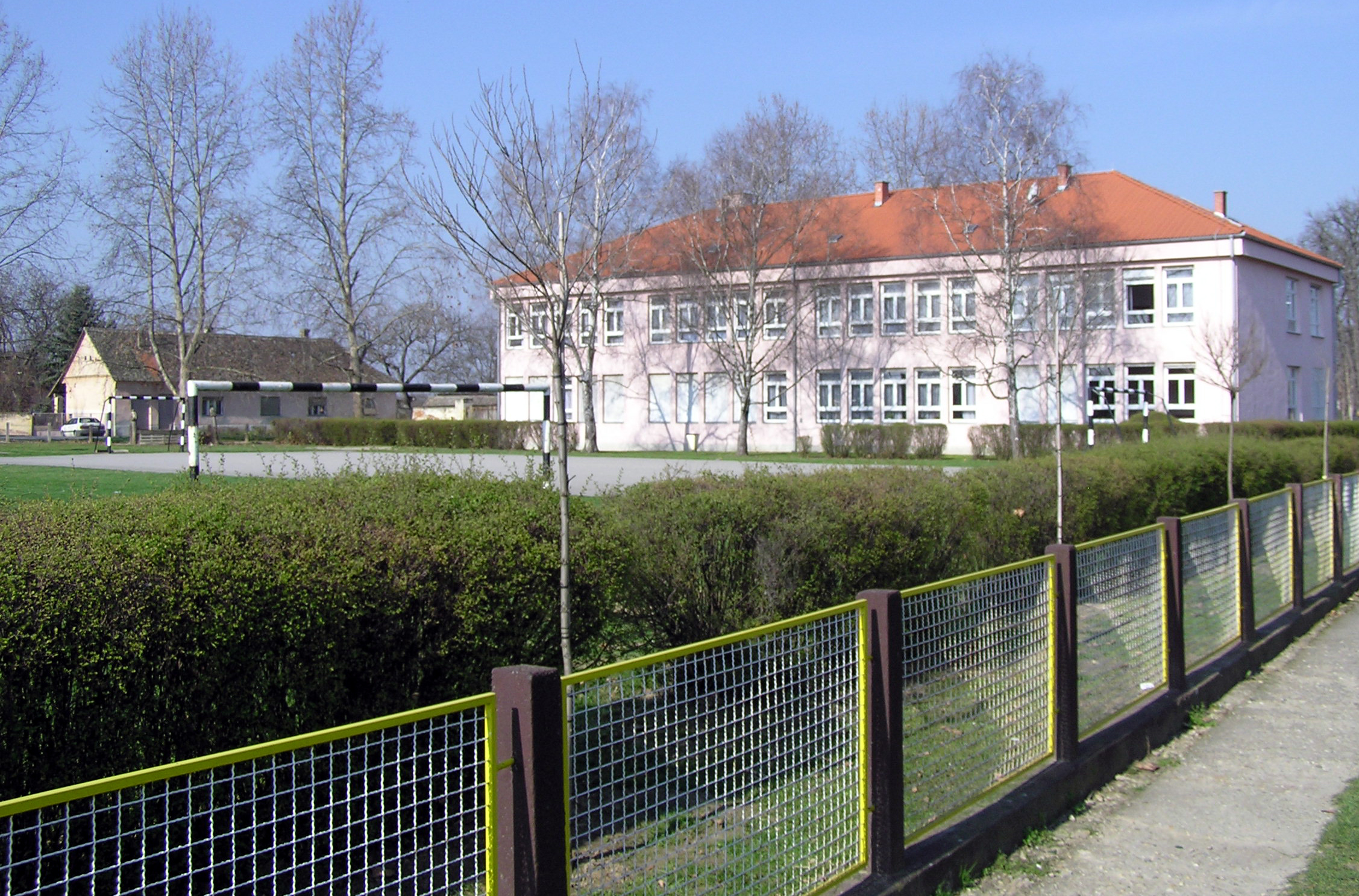 A kép a baranyabáni új - 1986-ban átadott - iskolaépületet ábrázolja.